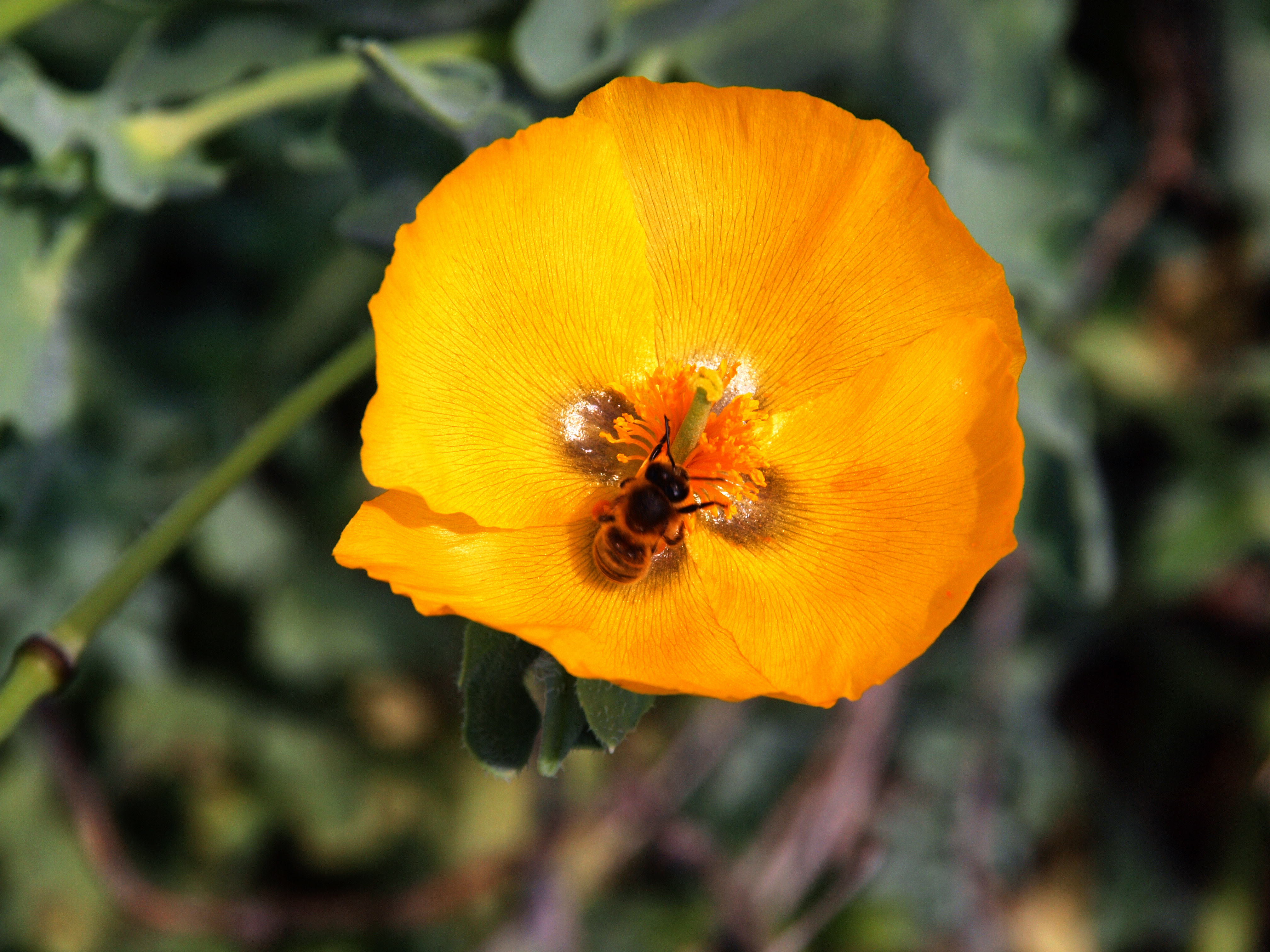 Partinello, Ouest Corse - Pavot cornu (Glaucium flavum), plante fréquente sur les sables du littoral méditerranéen, ici photographiée sur la plage de Caspiu.